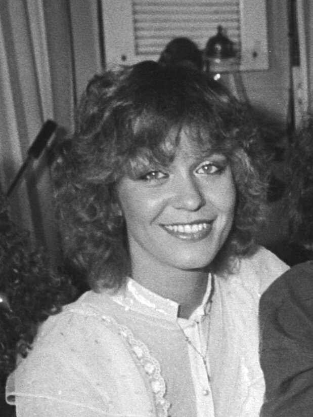 Diverse Nederlandse artiesten maken hun opwachting in het radioprogramma Open House. Dolly Dots (Achter: Angéla Kramers; Voor v.l.n.r.: Esther Oosterbeek, Ria Brieffies †, Angela Groothuizen, Patty Zomer, Anita Heilker)